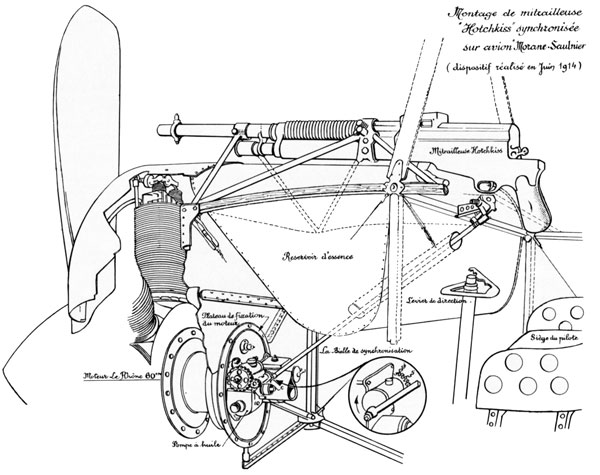 Sistema de disparo Garros